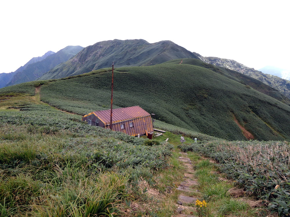 土樽から土合へ抜ける蓬峠とヒュッテを北方から望む。奥は武能岳。左奥に一ノ倉岳。